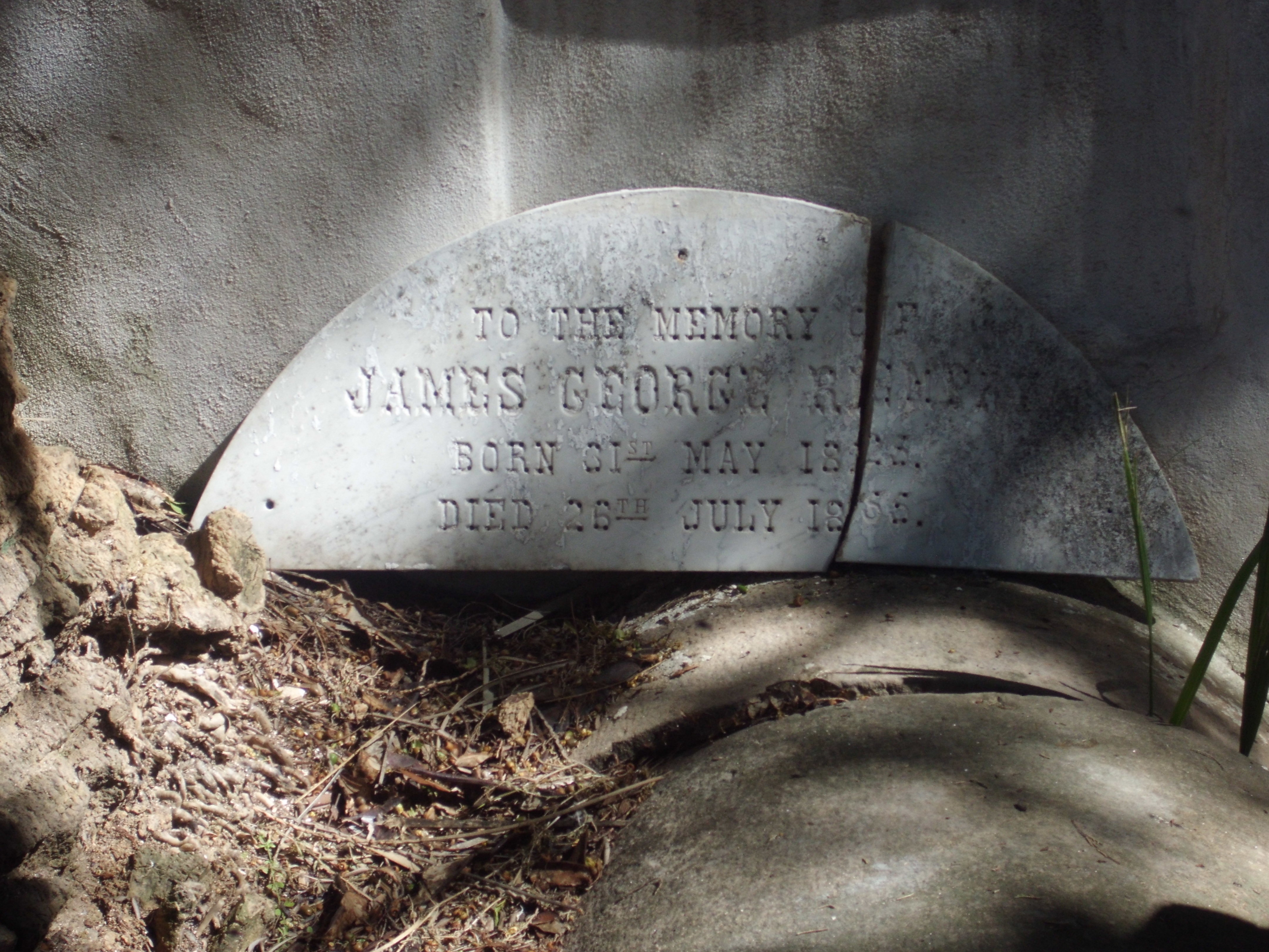 Fotografía de la tumba de James George Remfry (la más antigua del cementerio inglés de Linares) que he tomado con mi cámara digital CASIO EXILIM (14.1 MP 26 mm) la mañana del 28 de mayo de 2016. Posteriormente, la he enderezado con Picasa 3.